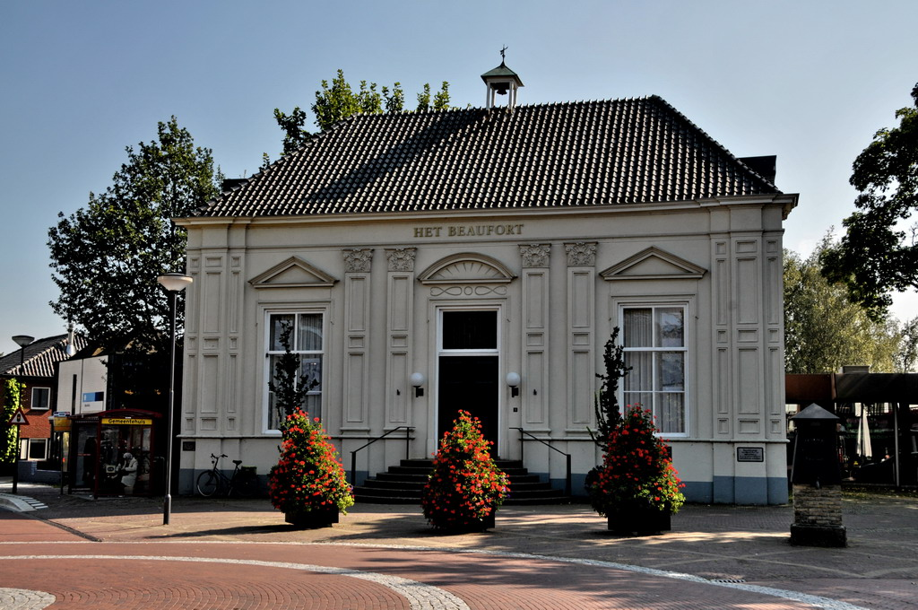 Het Beaufort is het voormalige gemeentehuis van de gemeente Markelo en is in 1872 gebouwd. In 1938 is het gebouw grondig verbouwd en kwam er een raadszaal die tevens als trouwzaal dienst deed.